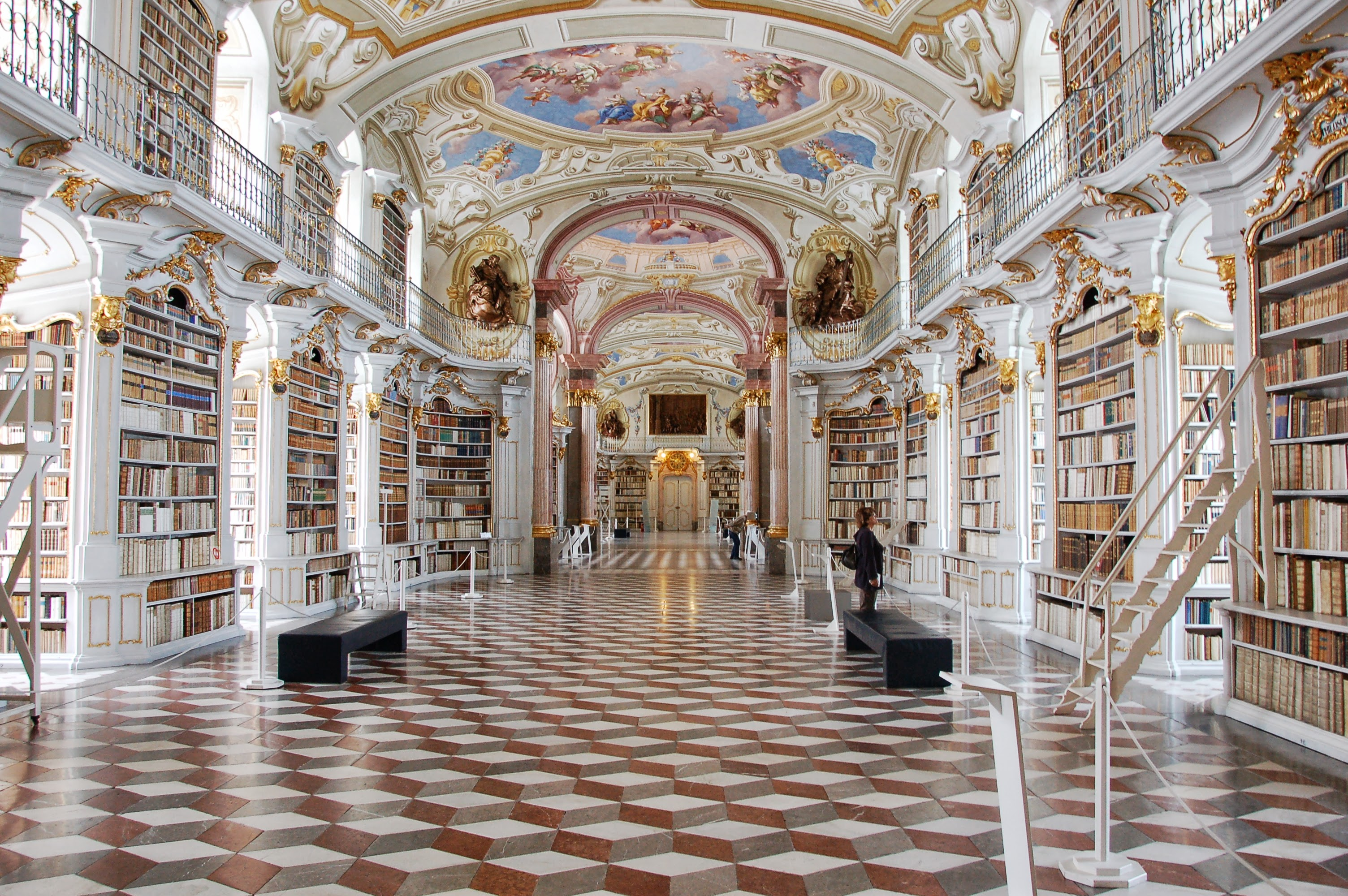 Gesamtanlage Stift Admont, Bibliothek, err.1776 vom BM. Josef Hueber